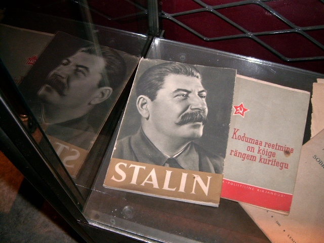 Boeken over stallinn